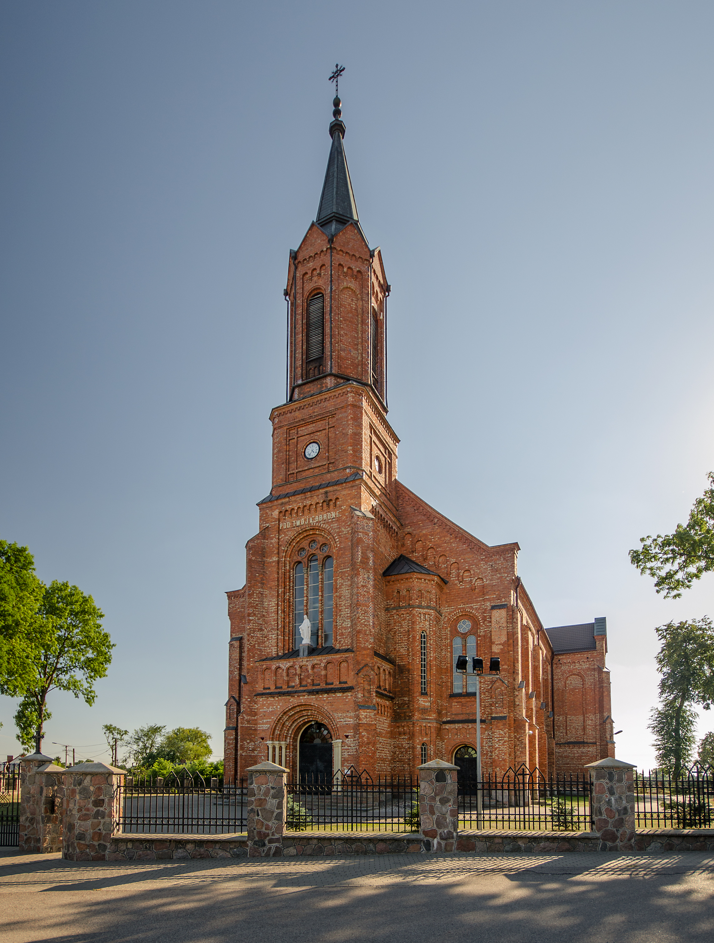 Śniadowo, kościół par. p.w. Wniebowzięcia NMP, 1906-1912